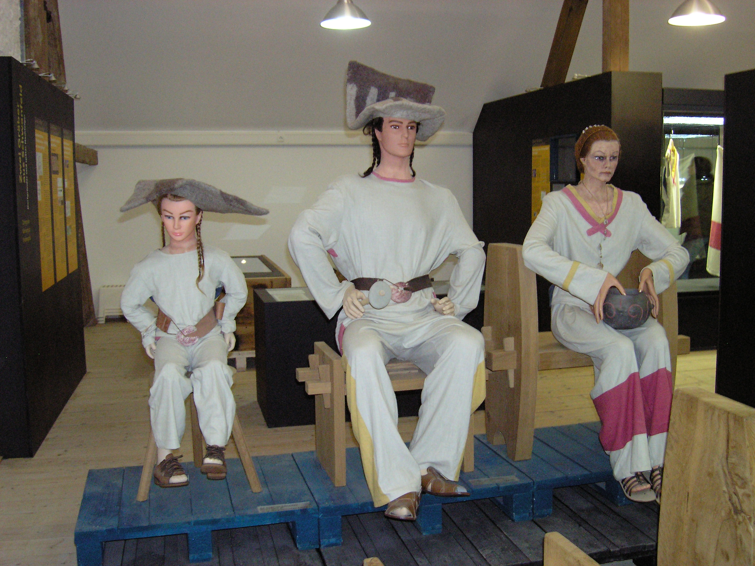 Bandkeramik-Museum Schwanfeld, Themenfeld Kleidung, Nachbildung der Tracht einer Priesterfamilie in Anlehnung an Idolfiguren der Bandkeramischen Kultur